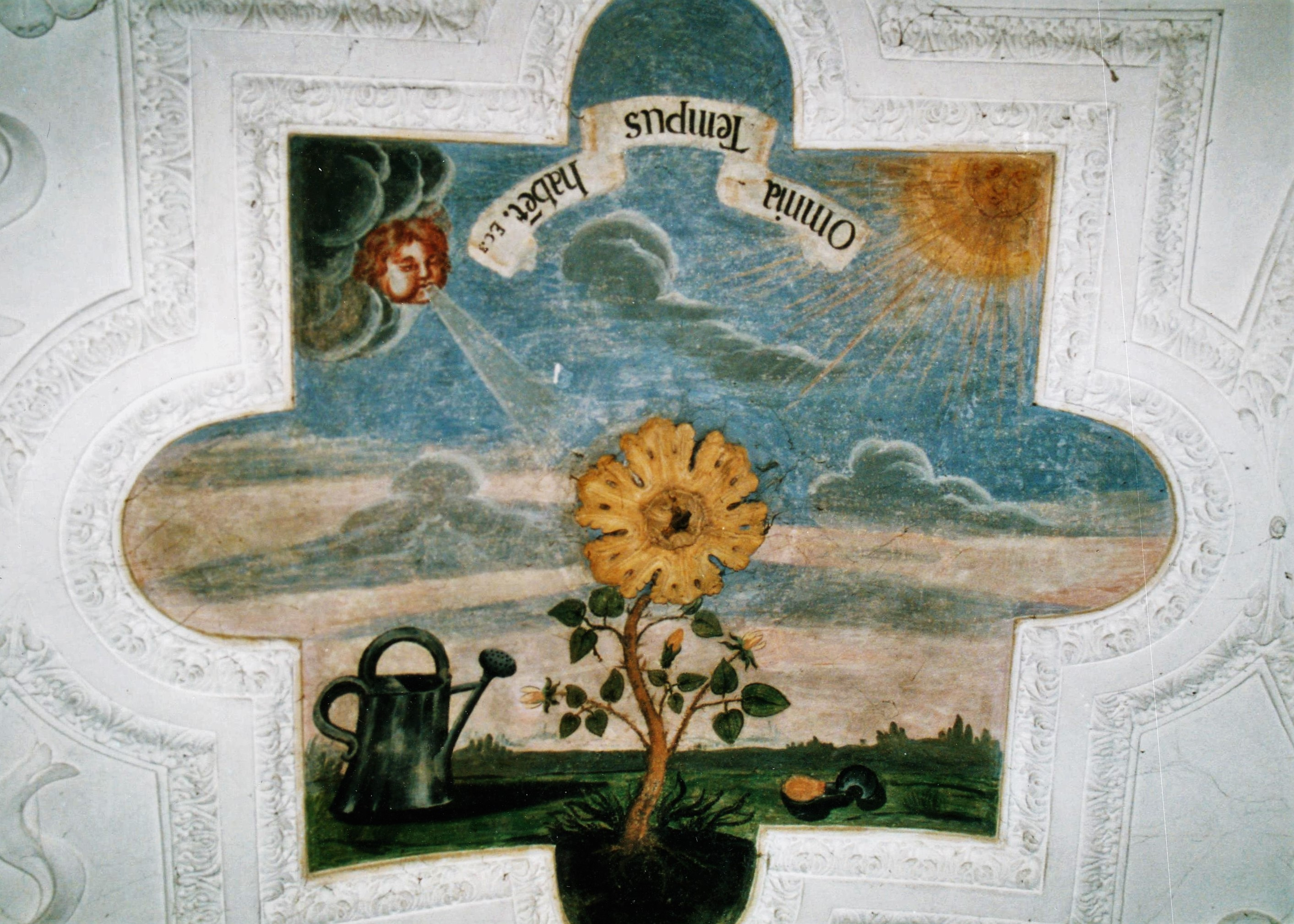 Emblematische Deckenmalerei (Secco-Malerei) im Kreuzgang des Klosters Wettenhausen (Ende 17. Jh.); Inschrift: Omnia tempus habent